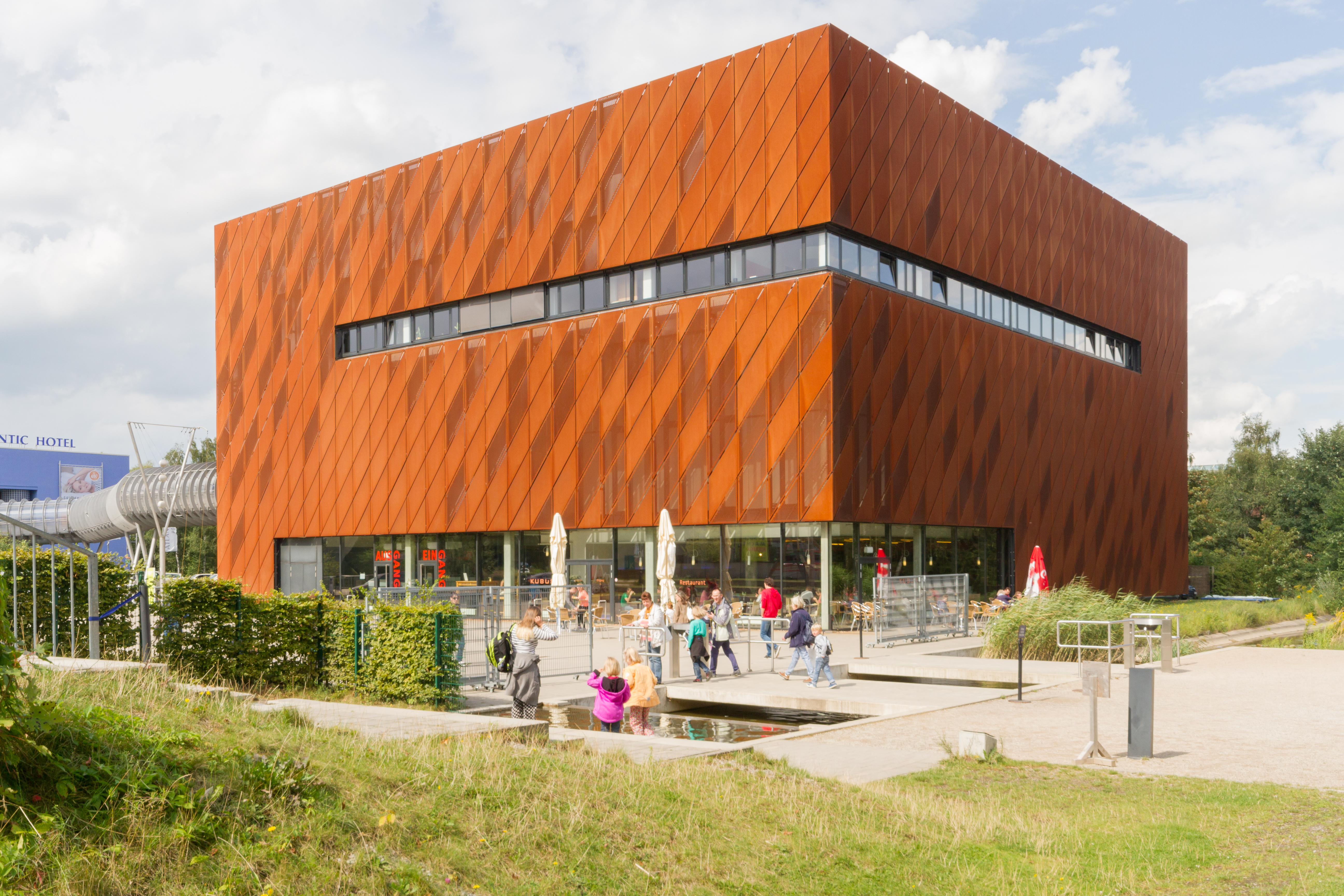 Die zum Universum Bremen gehörende SchauBox beherbergt jährlich wechselnde Sonderausstellungen.